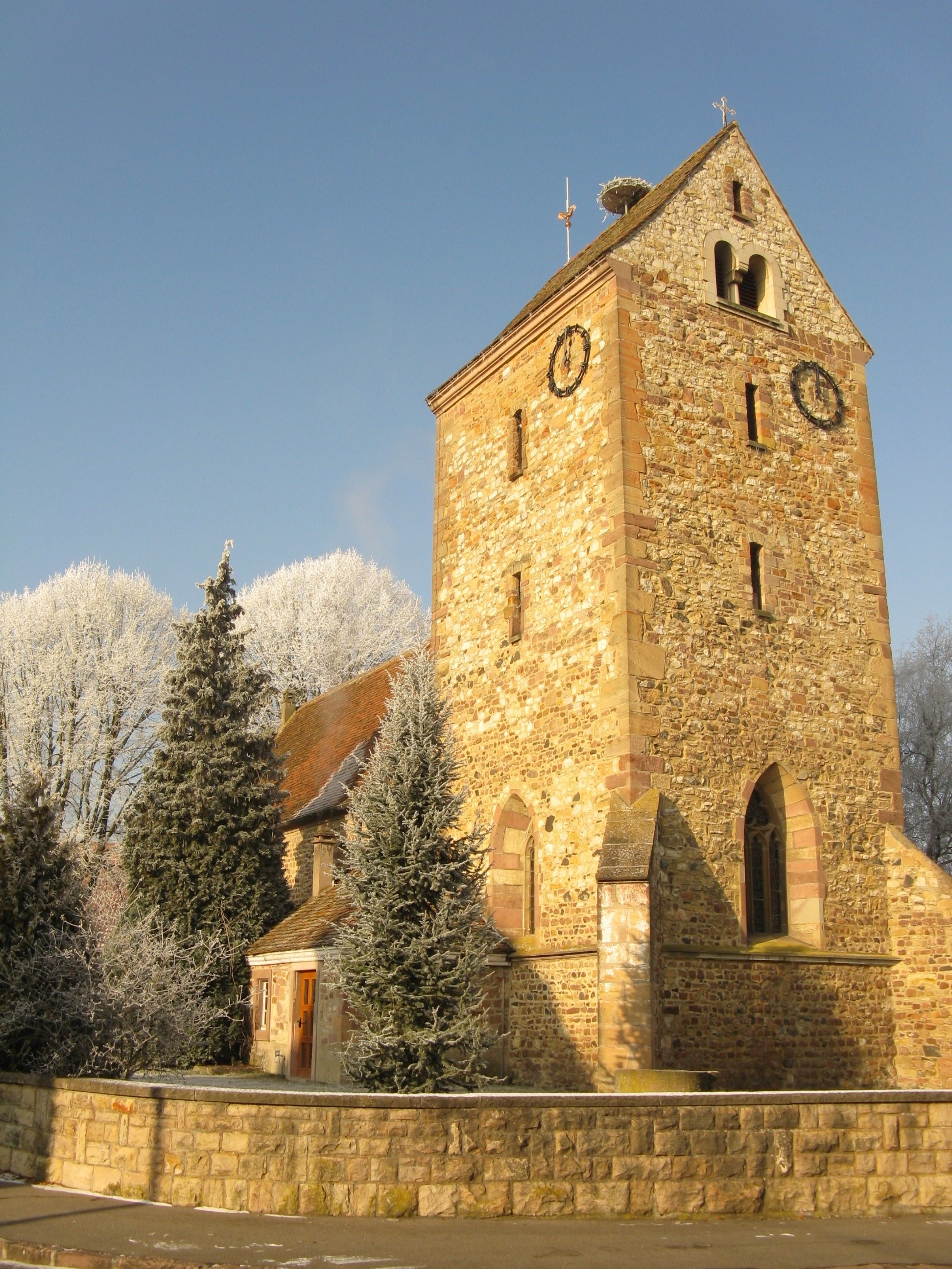 Église Saint-Urbain de Muntzenheim, en hivers